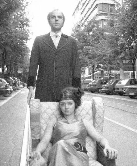 ЛП Дуо, једна од најстаријих фотографија